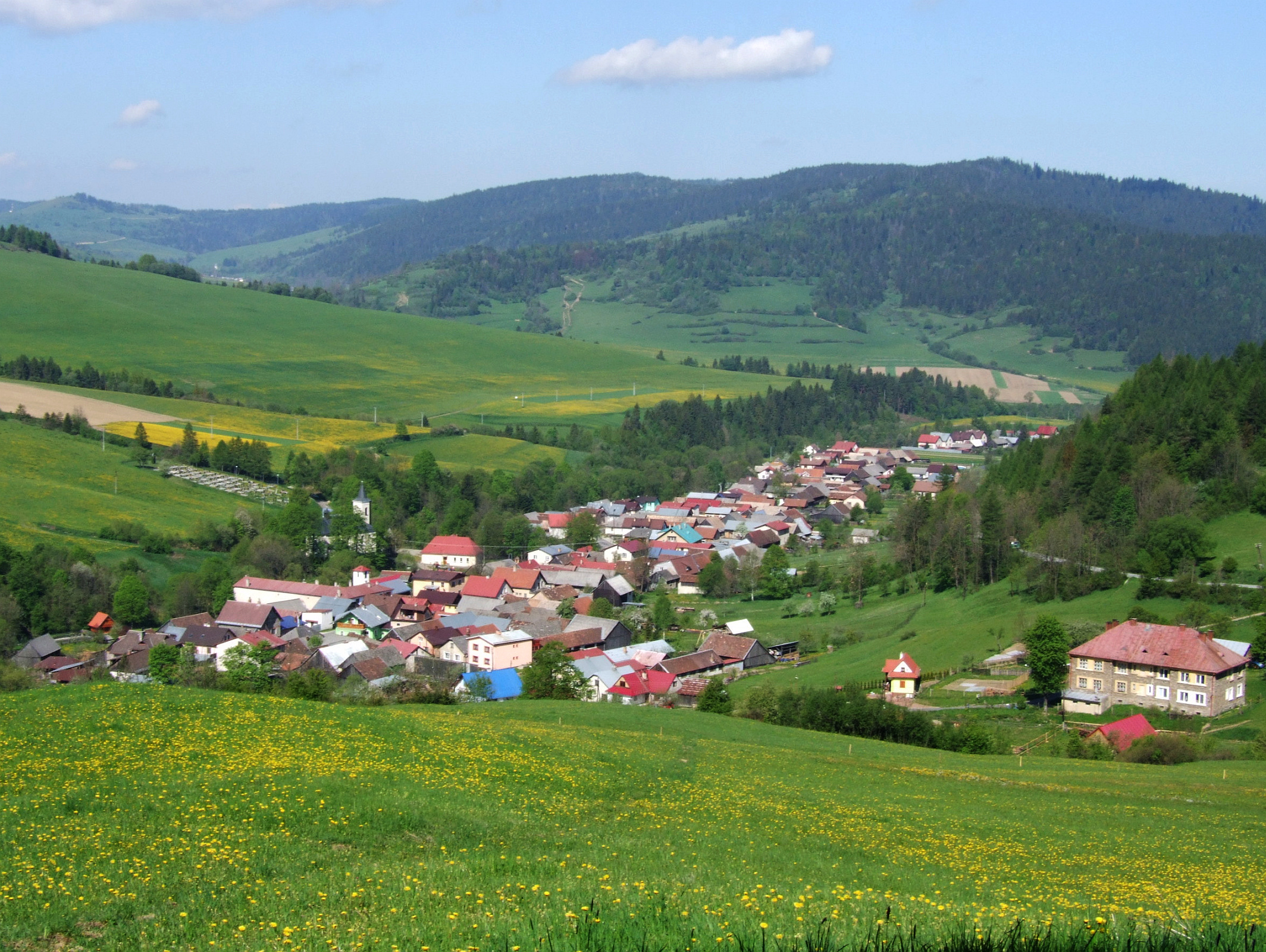 Veľká Franková (Wielka Frankowa)